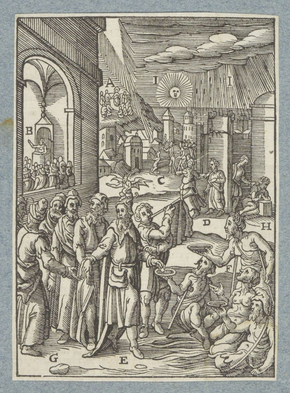 IdentificatieTitel(s): IJdele man wil geprezen worden door het volkObjecttype: prent boekillustratie albumblad Objectnummer: RP-P-2015-17-60-4Omschrijving: Op de voorgrond een ijdele man, met een duiveltje op zijn hoofd, die zijn geld geeft aan de armen. Hij toont de omstanders hoe 'goed' hij is, en laat dit rondbazuinen door de man naast hem. Op de achtergrond links de Bergrede. Bij verschillende elementen uit de voorstelling staan letters. De prent maakt deel uit van een album.VervaardigingVervaardiger: prentmaker: Christoffel van Sichem (II)naar prent van: Karel van Mallerynaar ontwerp van: Bernardino Passeriuitgever: Pieter Jacobsz. PaetsPlaats vervaardiging: AmsterdamDatering: 1629Fysieke kenmerken: houtsnede geplakt op albumblad; verso met tekst in boekdrukMateriaal: papier Techniek: houtsnede / boekdruk / plakkenAfmetingen: prent: h 104 mm × b 74 mmToelichtingDe prent is afkomstig uit een van de uitgaven van P.J. Paets uit Amsterdam. De prent wordt voor het eerst gebruikt in: Der Zielen Lust-hof. Leuven, I.Jacbosz voor P.J. Paets [= Amsterdam, P.J. Paets], 1629. De voorstelling is gekopieerd naar een prent van Karel van Mallery voor: Nadal, Jerónimo. Evangelicae Historiae Imagines. Antwerpen, M. Nutius, 1593.OnderwerpWat: '... that your alms may be in secret' ~ doctrine of Christ on possessions (Matthew 6:4)Verwerving en rechtenVerwerving: onbekend 1936Copyright: Publiek domein